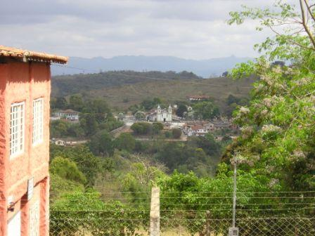 Vista do núcleo original de Santo Antônio do Leite, a partir do lugar da Chapada, no mesmo distrito. Note-se a Igreja de Santo Antônio, inaugurada em 1858.